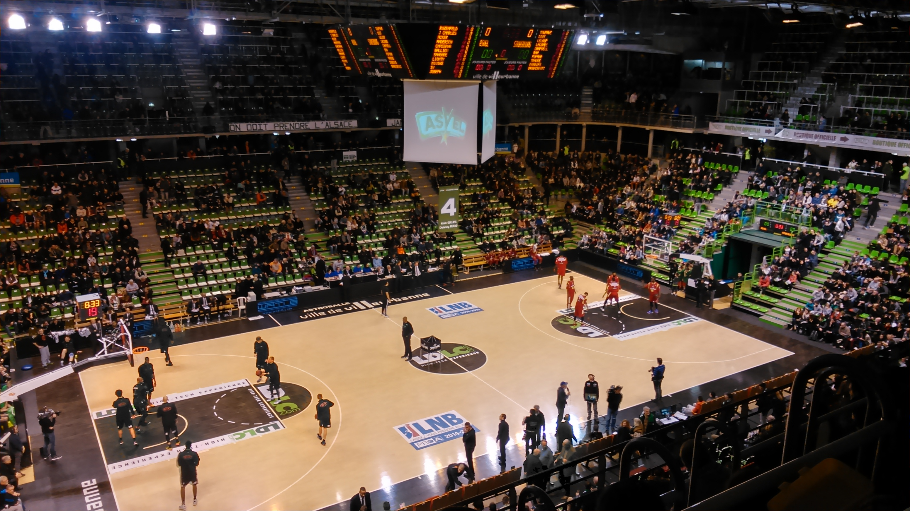 ASVEL - Strasbourg 2015